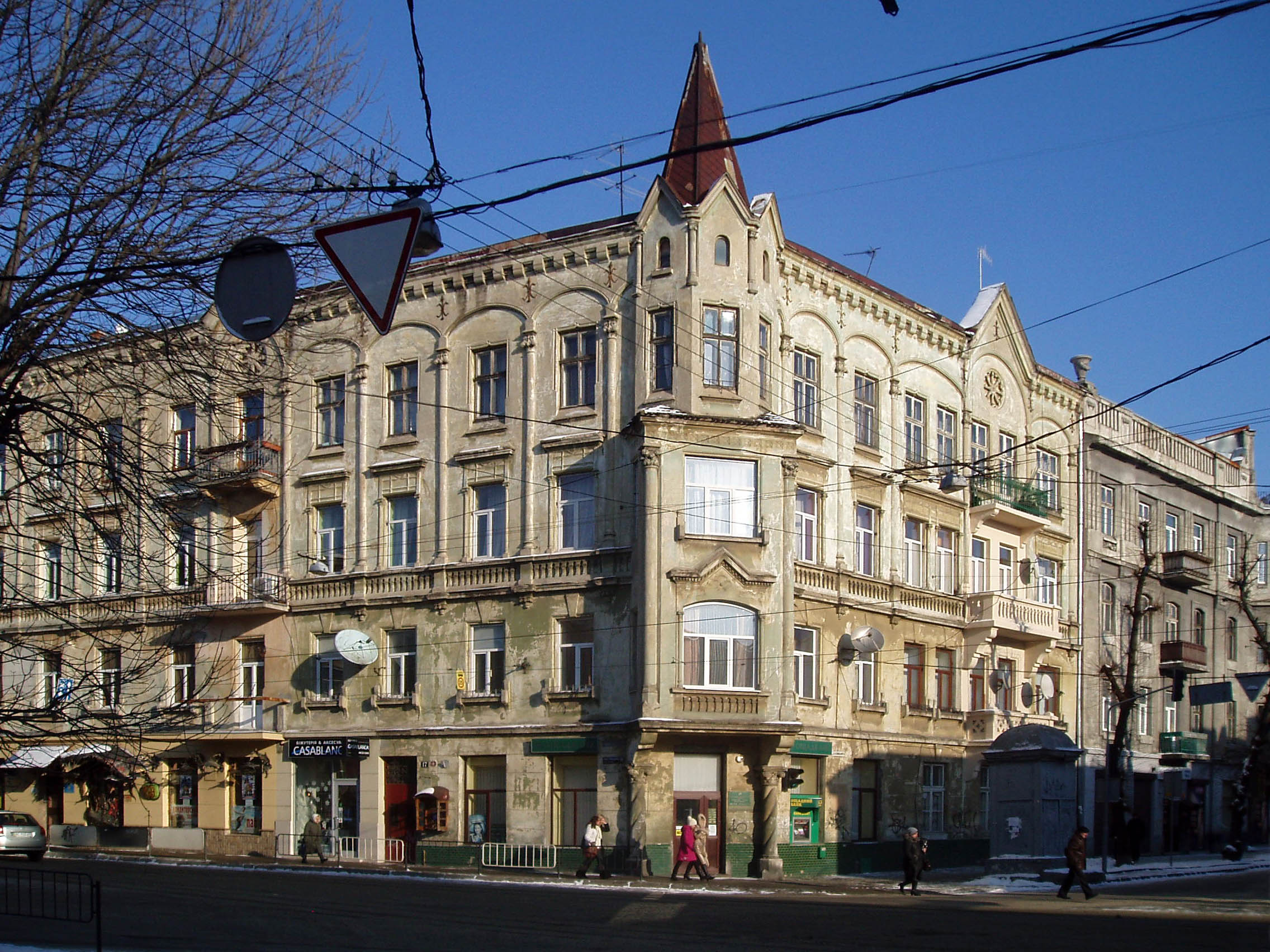 Ріг вулиць Франка і Левицького у Львові. Будинок під назвою «Кручені стовпи». Збудований 1911 року, архітектор Саломон Рімер (1858-1931).